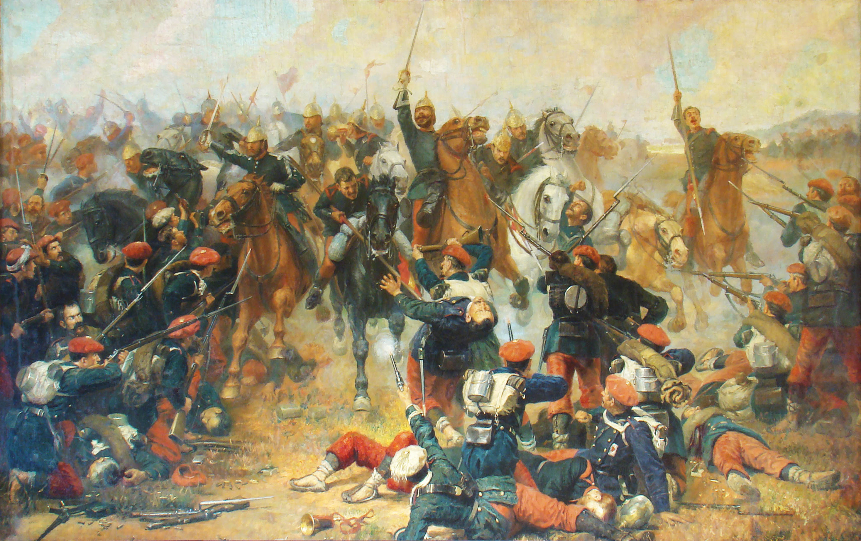 “La Carga de Treviño” o “Batalla de Treviño”, también conocida como “Defensa del Coronel Contreras”, tuvo lugar durante la Tercera Guerra Carlista, concretamente el 7 de julio de 1875, entre el Regimiento de Lanceros del Rey, al que tan solo le quedaban 98 caballos y lanceros, atacando al Tercer Batallón de Navarra de los carlistas, para liberar la ciudad de Vitoria. Es un lienzo colosal de 4,5 por 7 mts, 32 metros cuadrados de lienzo. Fue adquirido por el entonces Ministerio de la Guerra para la Academia de Caballería de Valladolid, siendo tercera medalla de la Exposición Nacional de Bellas Artes de 1897.